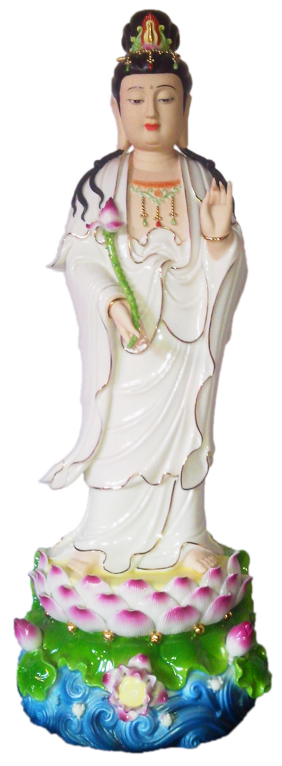 中文（中国大陆）: 大势至菩萨，自己拍摄。